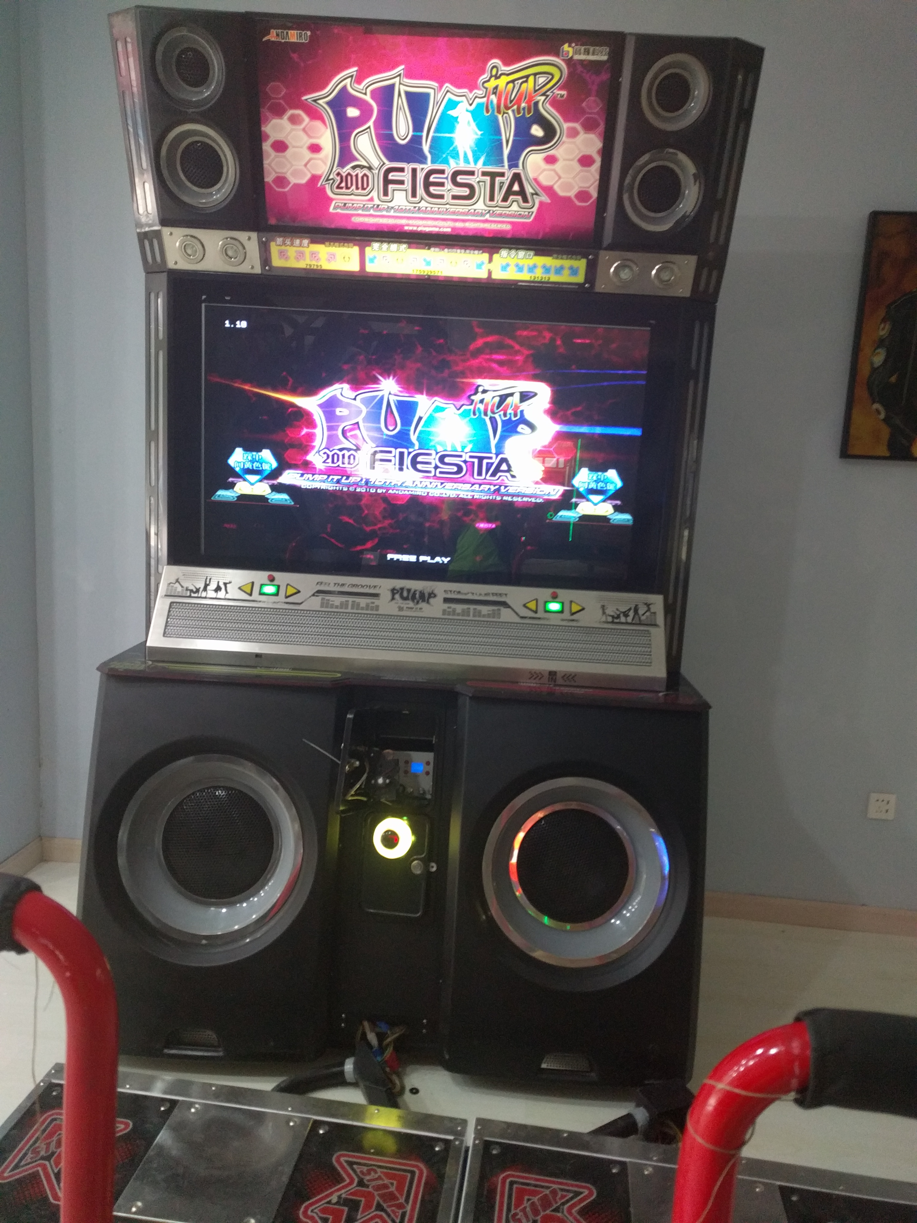 搭载Pump It Up 2010 Fiesta版本的TX框体